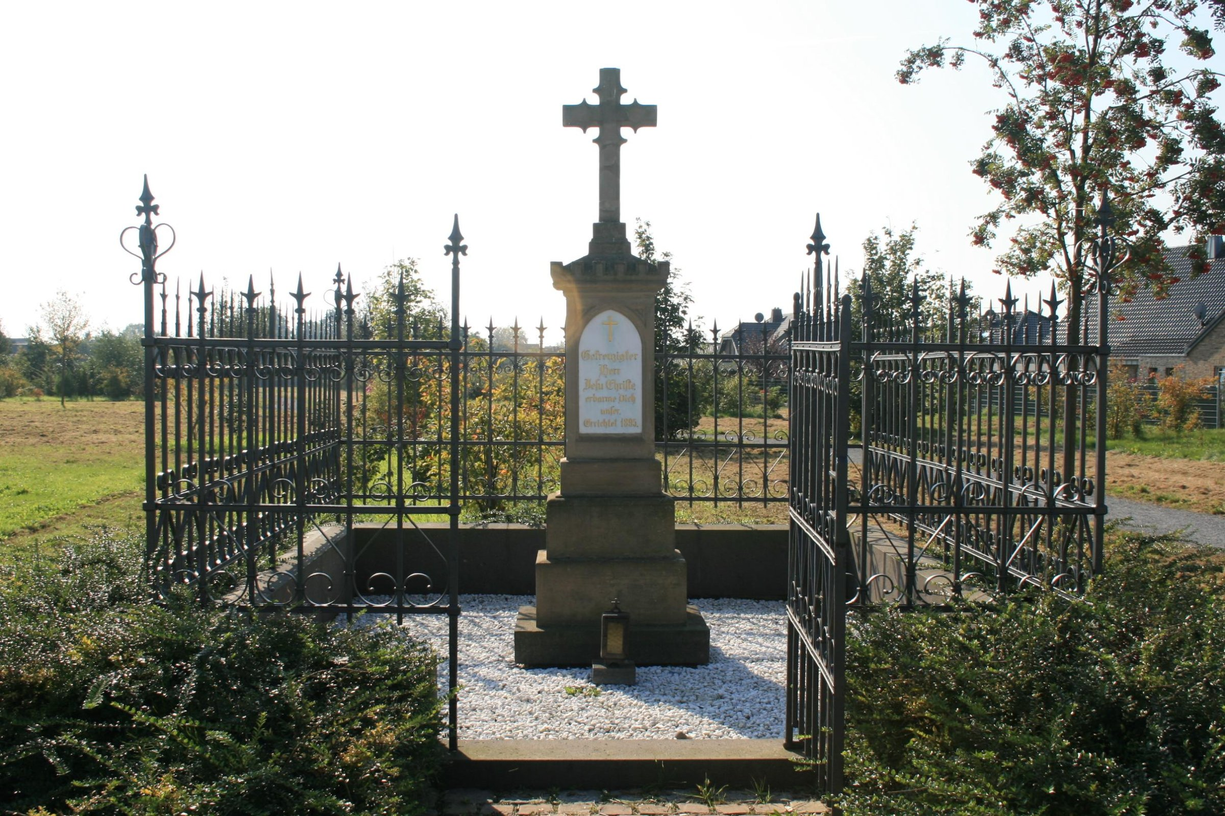 Baudenkmal in der Gemeinde Jüchen Nr. 151